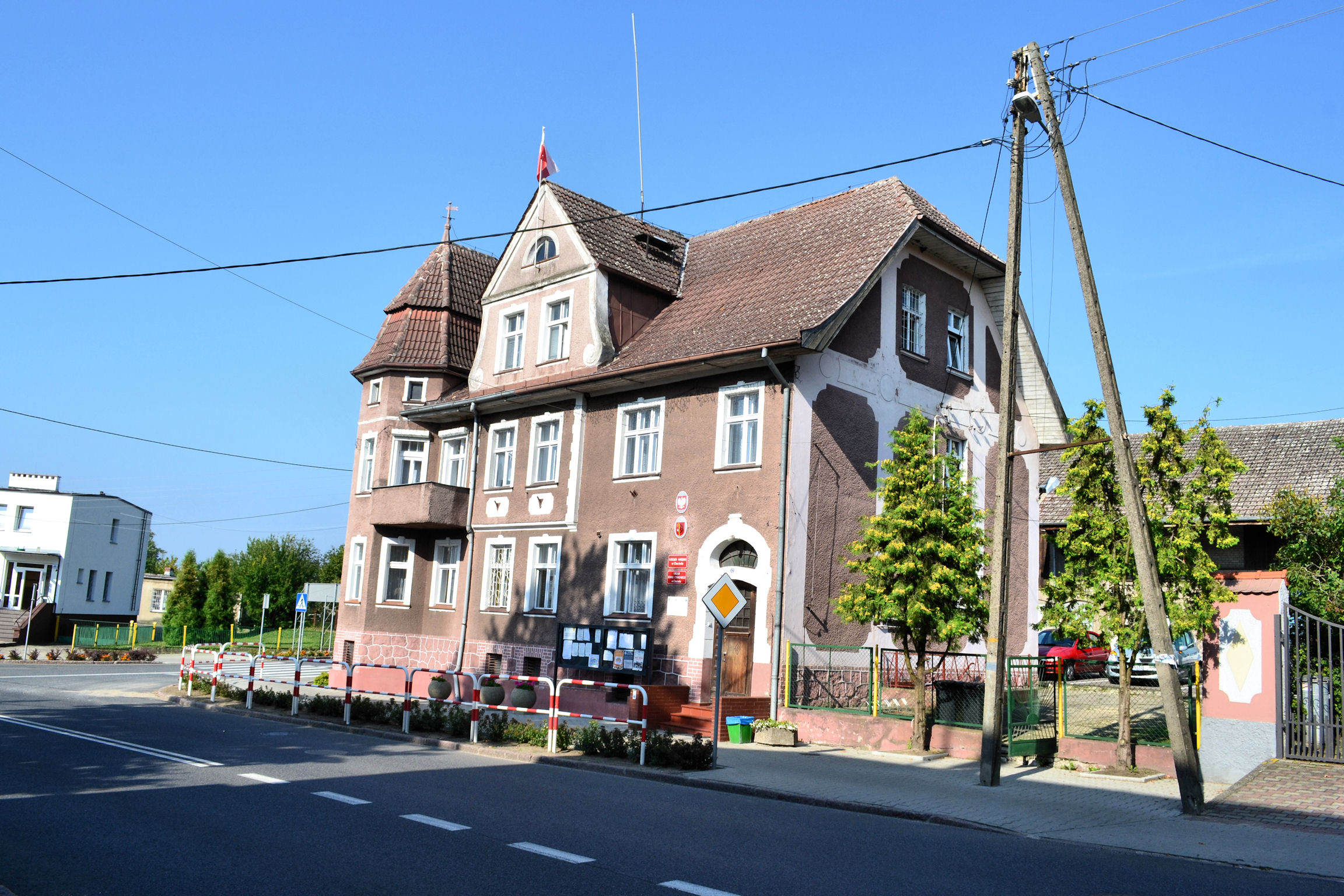 Chociwel - siedziba Urzędu Miejskiego